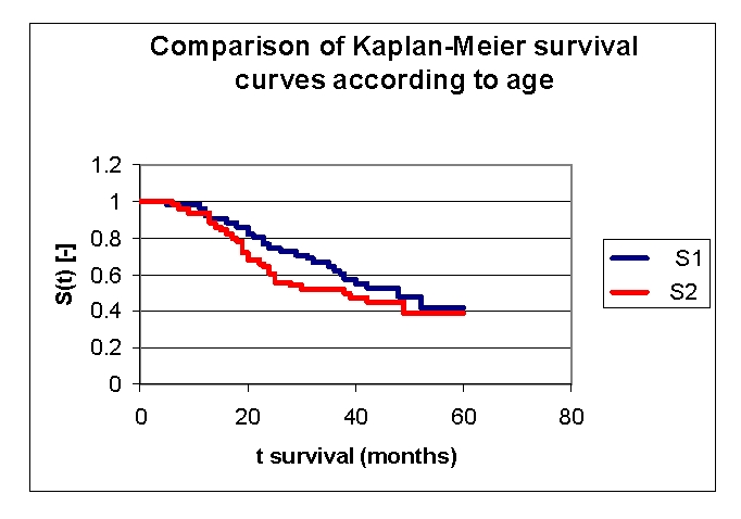 Kaplan–Meier survival curves in relation to age